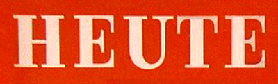 Zeichen ohne Schöpfungshöhe